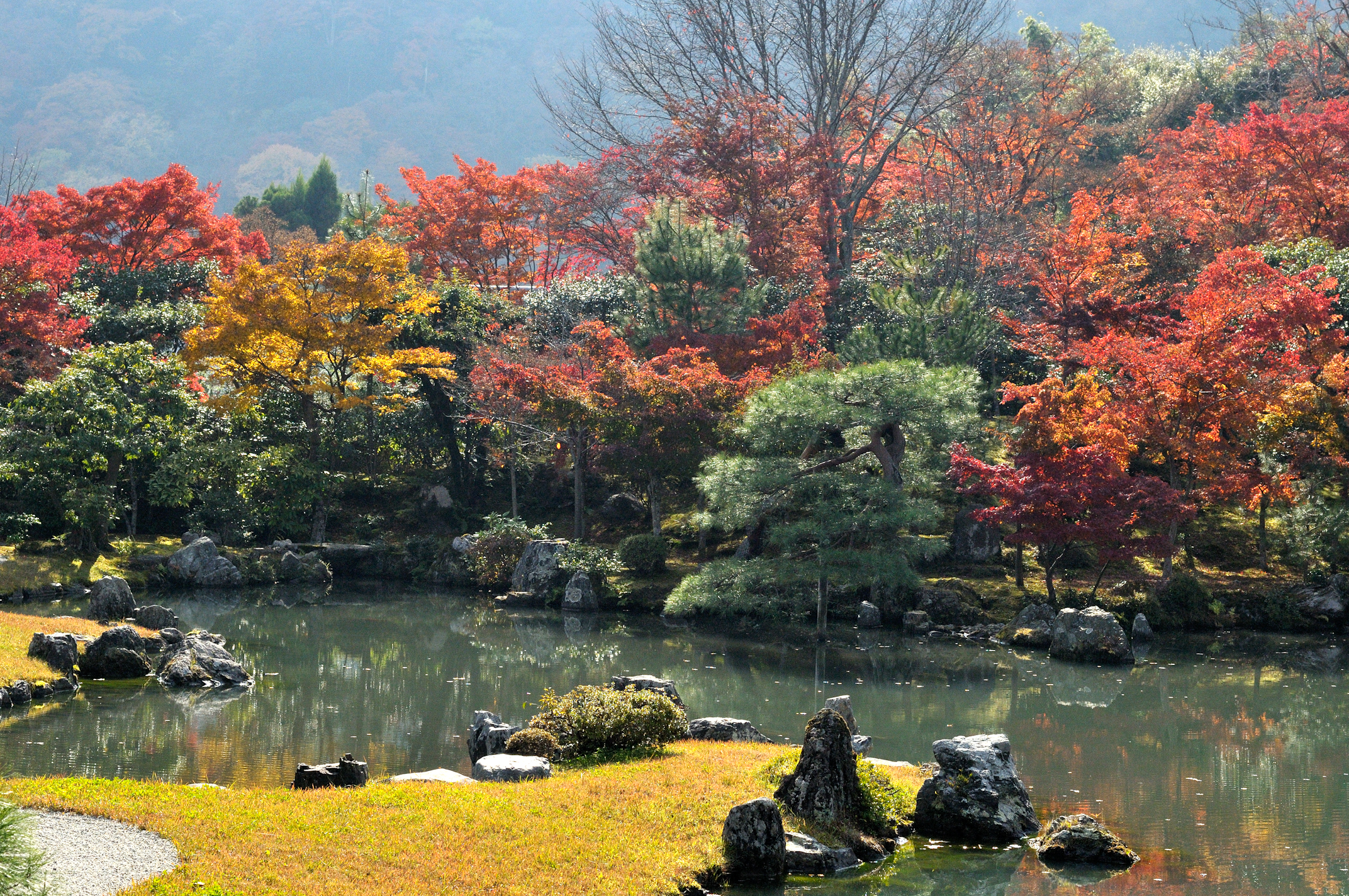 at tenryuji-temple.